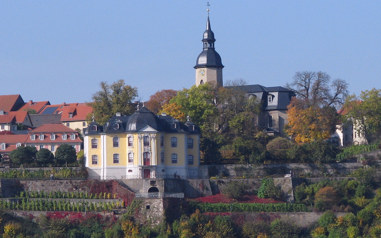 Dornburg an der Saale Dornburger Schlösser Rokokoschloss Foto 2008 Wolfgang Pehlemann Wiesbaden IMG_0102